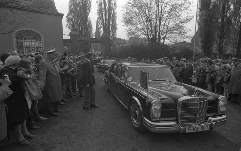 Staatsbesuch des belgischen Königspaares Abendempfang in der Commende mit dem Gesangverein aus Muffendorf